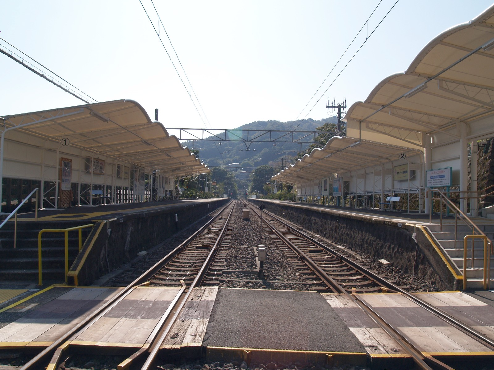 伊豆大川駅ホーム（隣接する踏切より撮影）